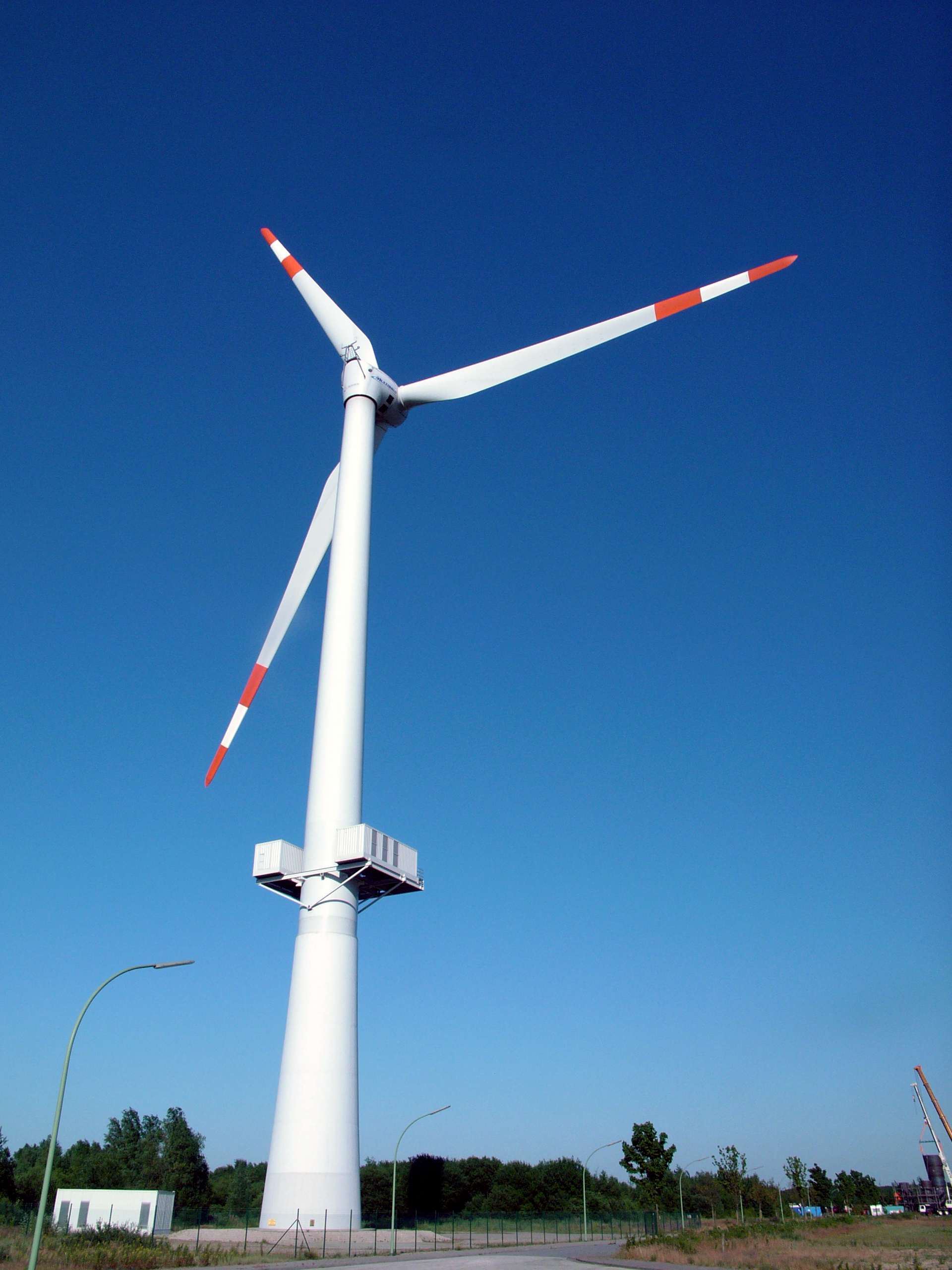 The Multibrid 5000 prototype, build end of 2004 north of Bremerhaven, Germany, as a test site for use in offshore wind farms. Background right the tripod for the next M5000 is under construction. Nennleistung: 5 MW, elektr. Einzelblattverstellung, Blattwinkel- und Drehzahlregelung, Stahlrohrturm Einschaltgeschwindigkeit: 4 m/s, * Nenngeschw.: 12,5 m/s, Abschaltgeschw.: 25 m/s Rotor-Durchmesser: 116 m, Rotor-Fläche: 10 568 m**2, Nenn-Drehzahl: 14,8 /min Stufenplanetengetriebe, Nenndrehmoment: 3 600 kNm, Übersetzungsverhältnis: 1:10 Synchron-Generator, Nennleistung: 5260 kW, Nennspannung: 3300 V, Drehzahl: 45,1-148,5 /min Gewicht Rotorblatt: 16,5 t, Nabe: 62 t, Gondel: 233 t